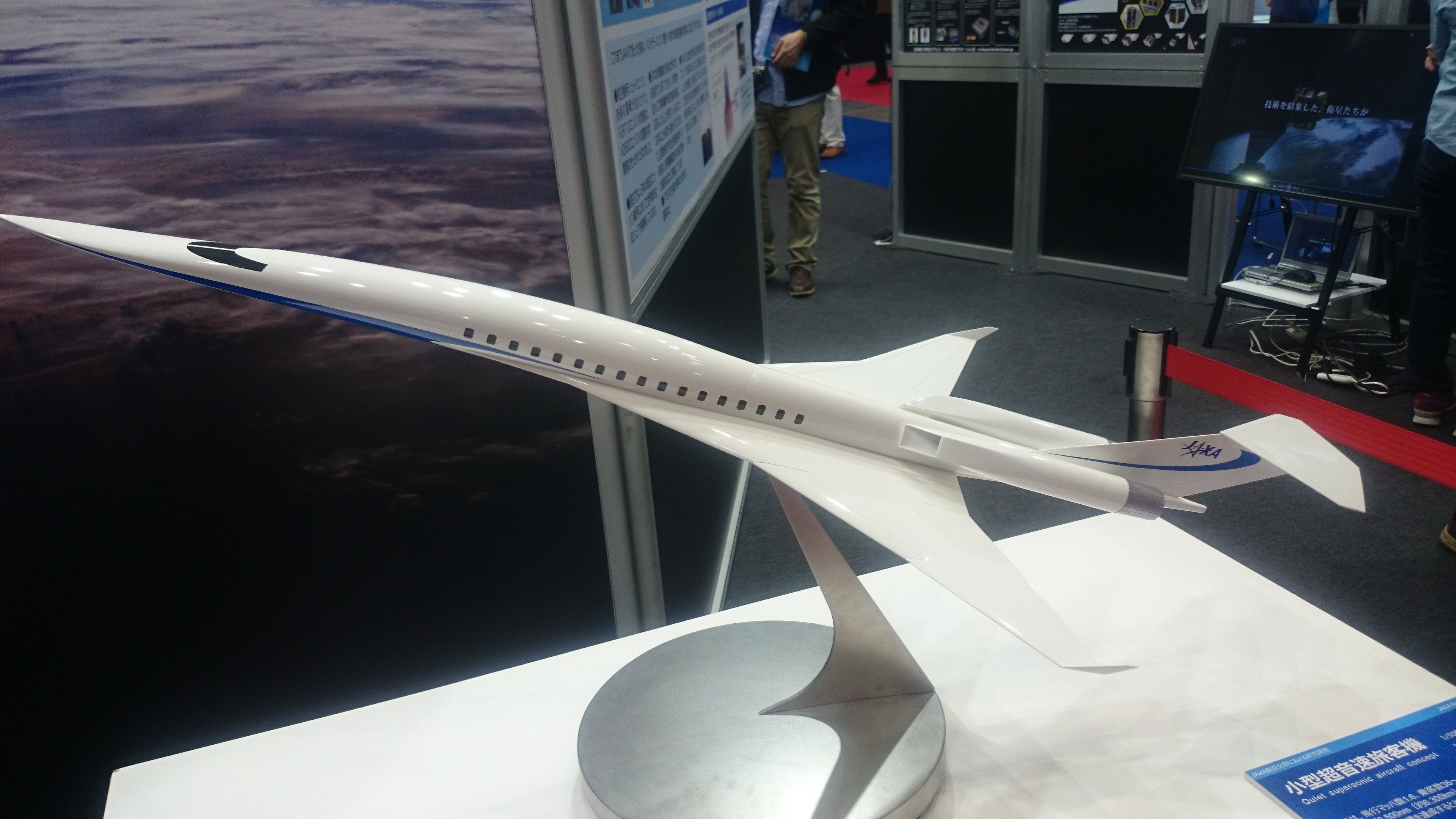 小型超音速旅客機 国際航空宇宙展